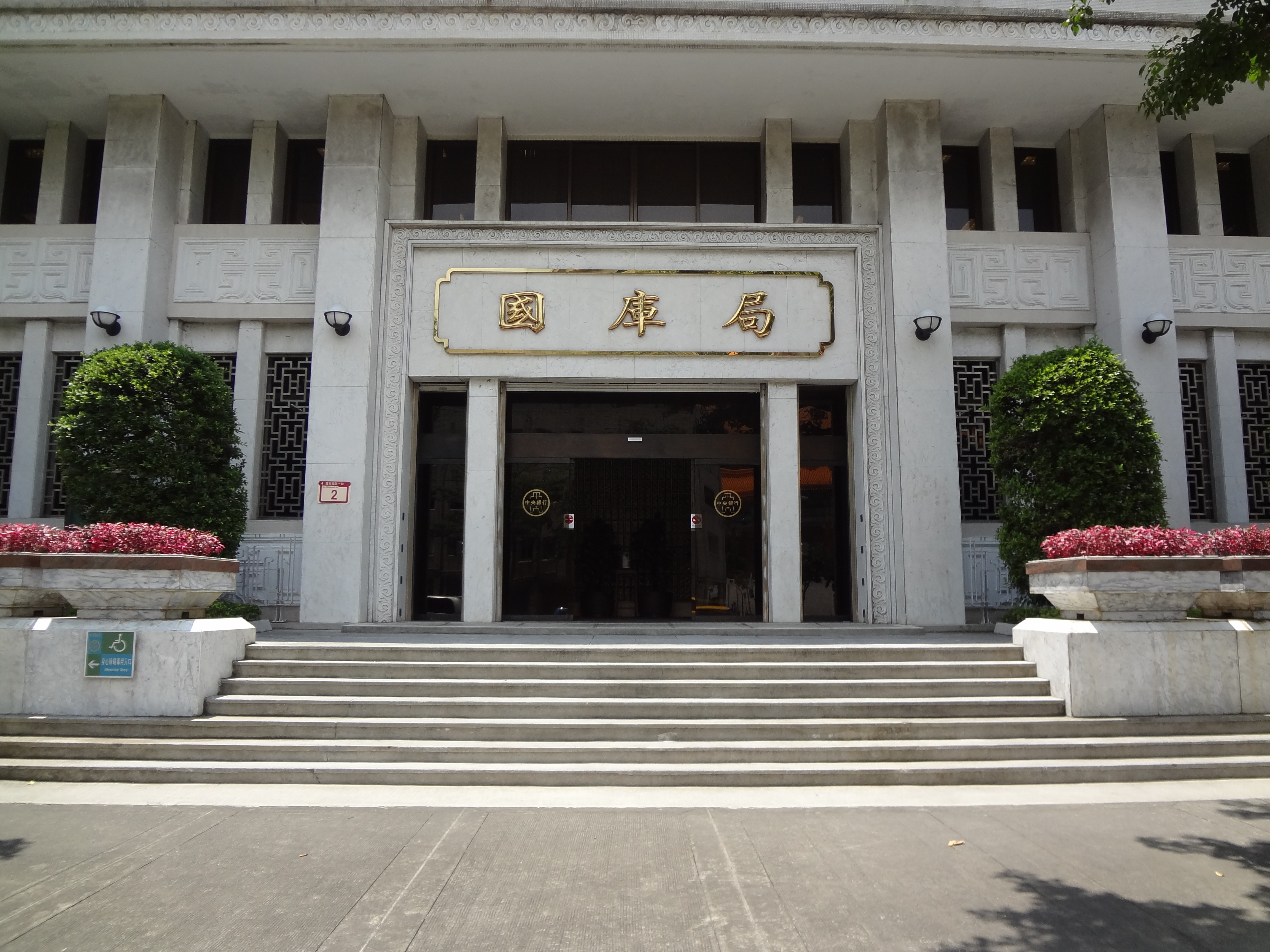 中華民國中央銀行國庫局。